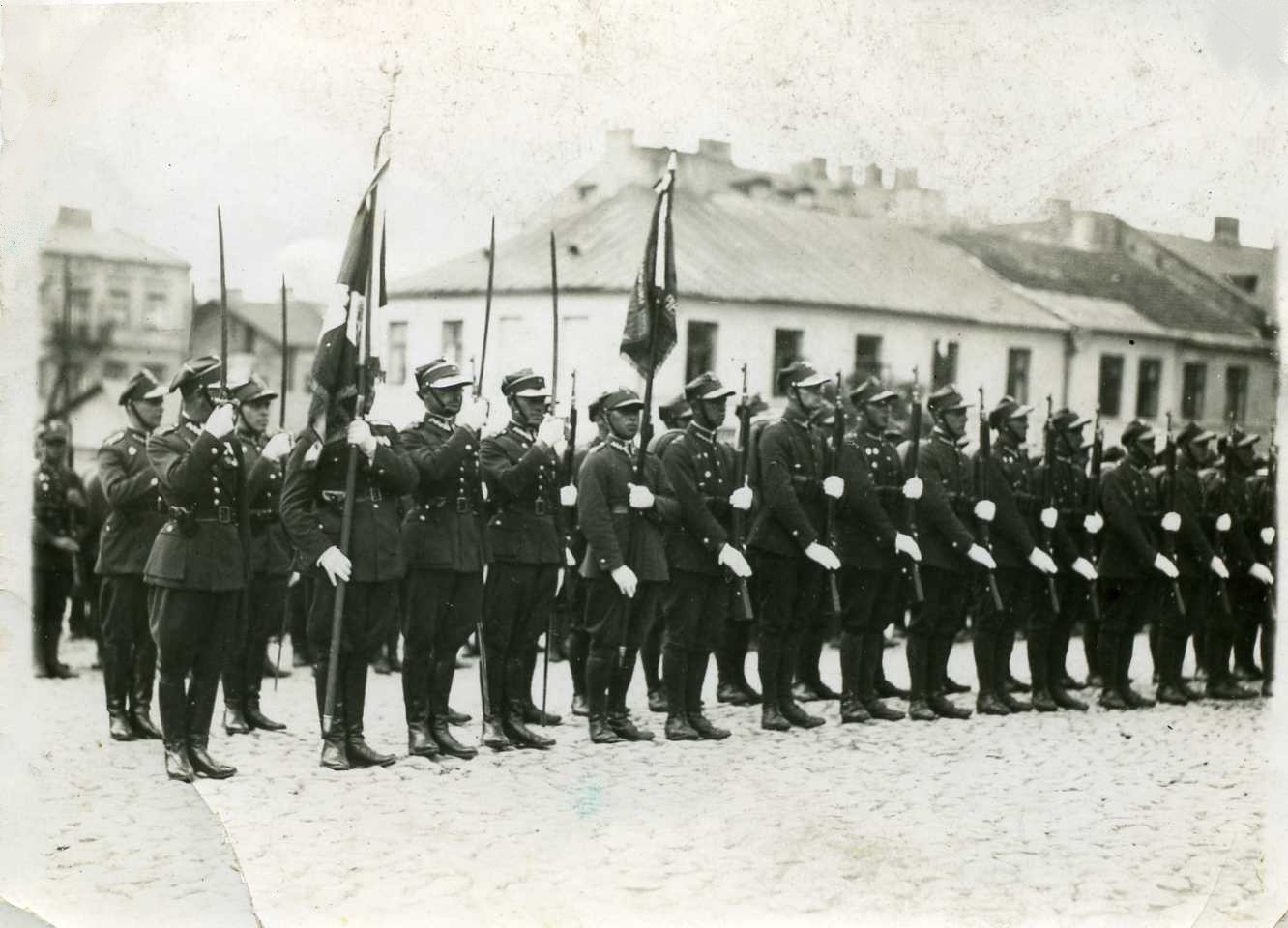 poczet sztandarowy i kompania honorowa 37 Łęczyckiego Pułku Piechoty, zdjęcie pochodzi z 1934 r (26 maja – Święto Pułku?)